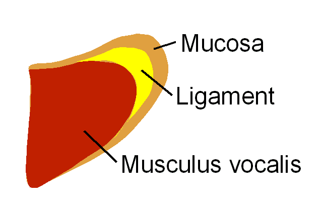 Schematische Darstellung einer Stimmlippe